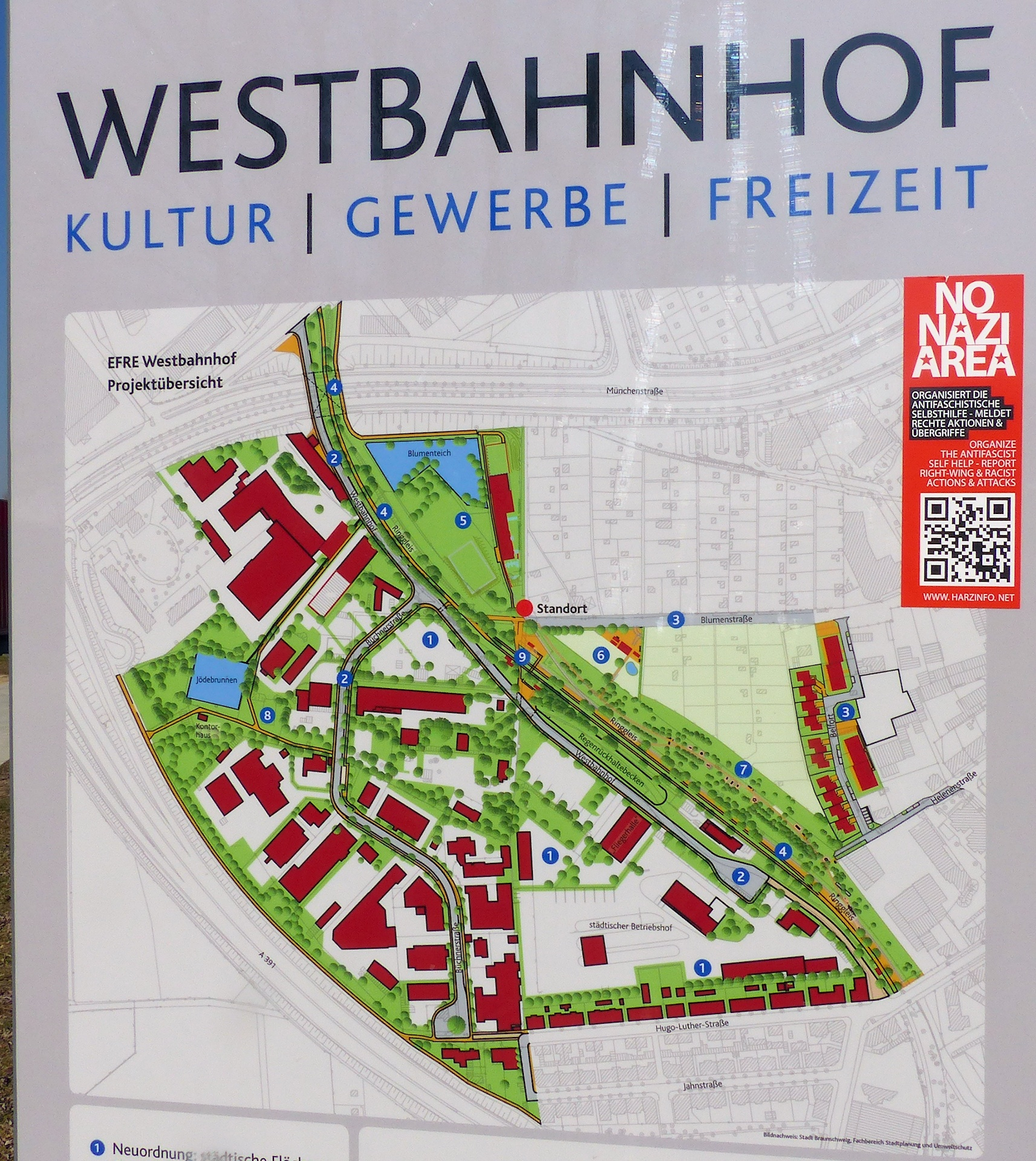 Schild an Hinweistafel beim Jugendplatz mit einer Übersichtskarte des Westbahnhofgeländes, aufgestellt von der Stadt Braunschweig.